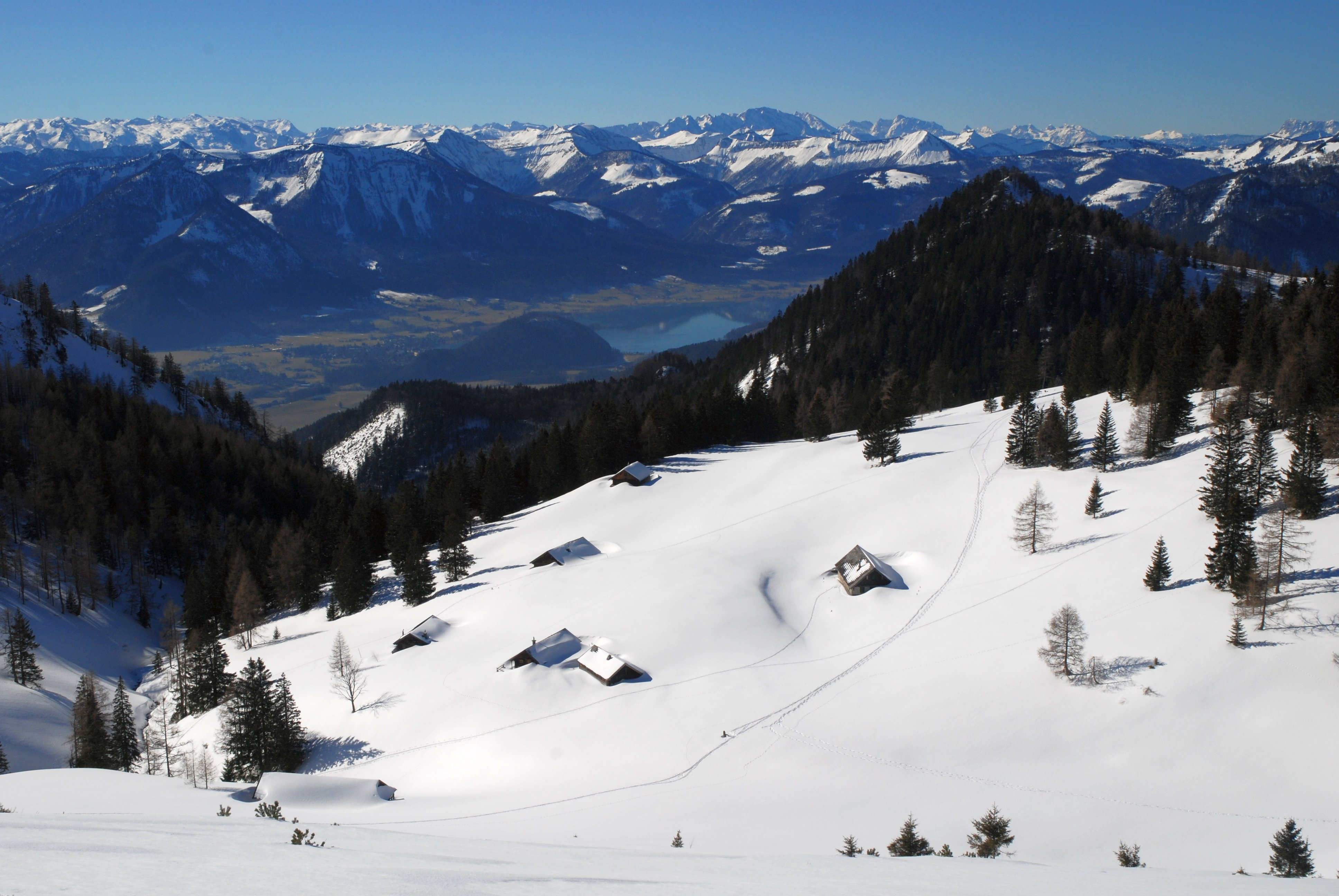 Leonsbergalm im Winter, Salzkammergut, Österreich